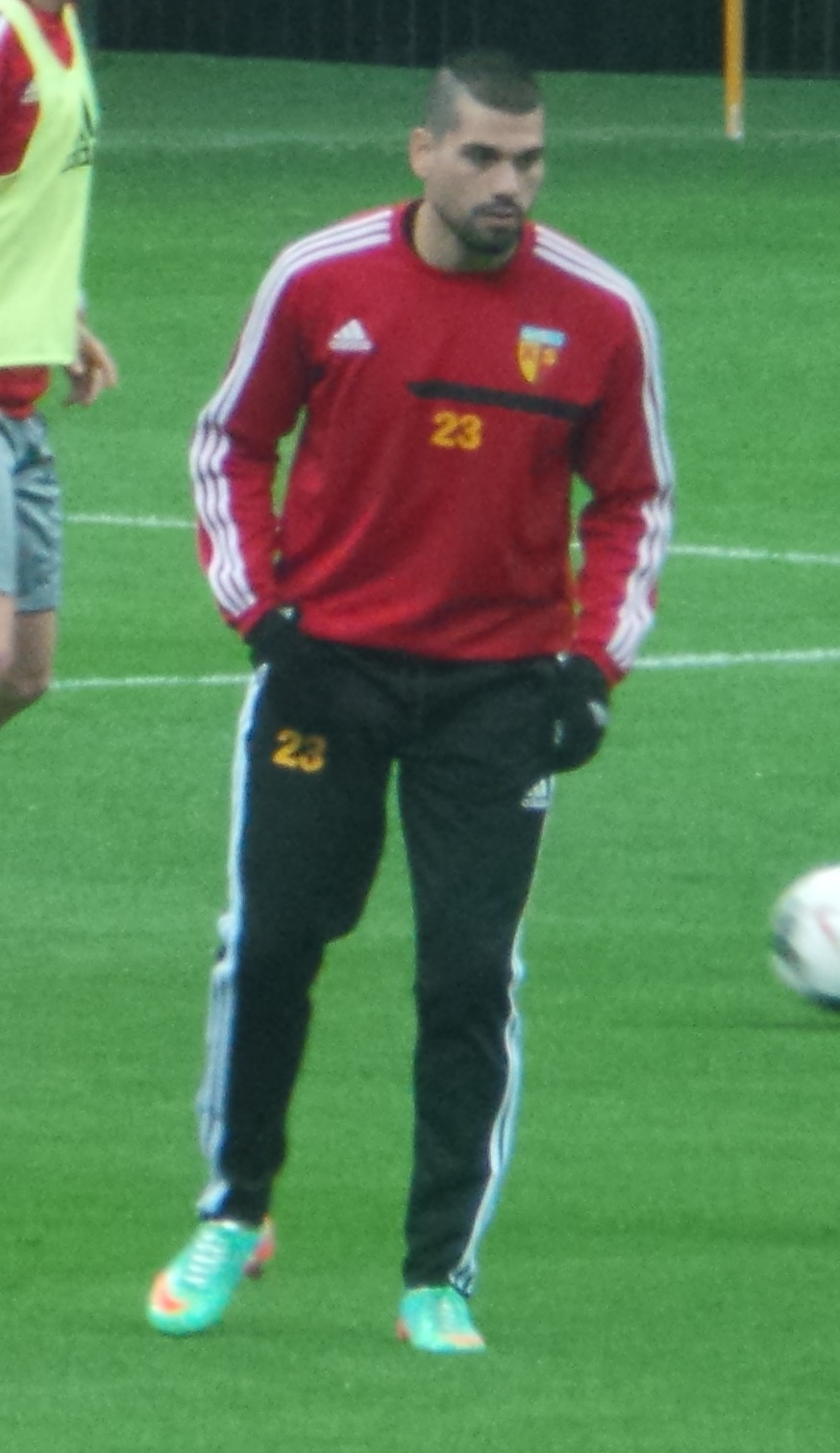 Taner Yalçın